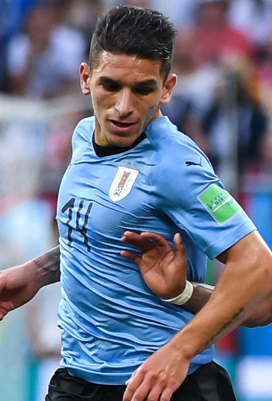 Лукас Торрейра